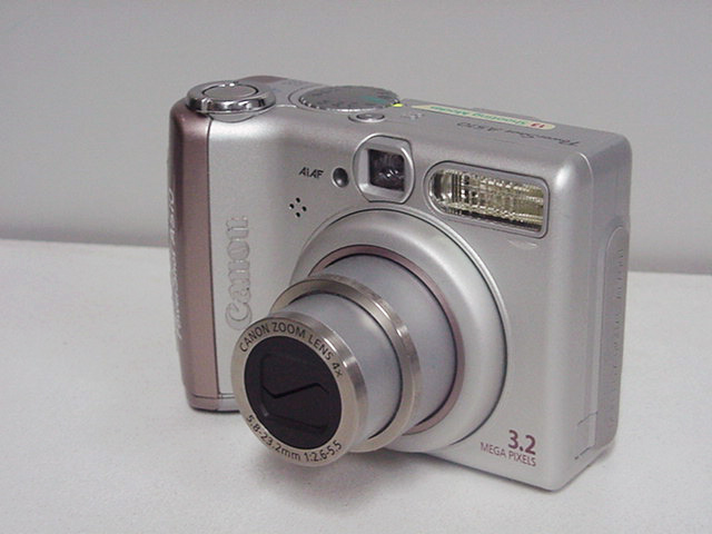 Appareil photographique numérique Canon PowerShot A510 - Vue générale